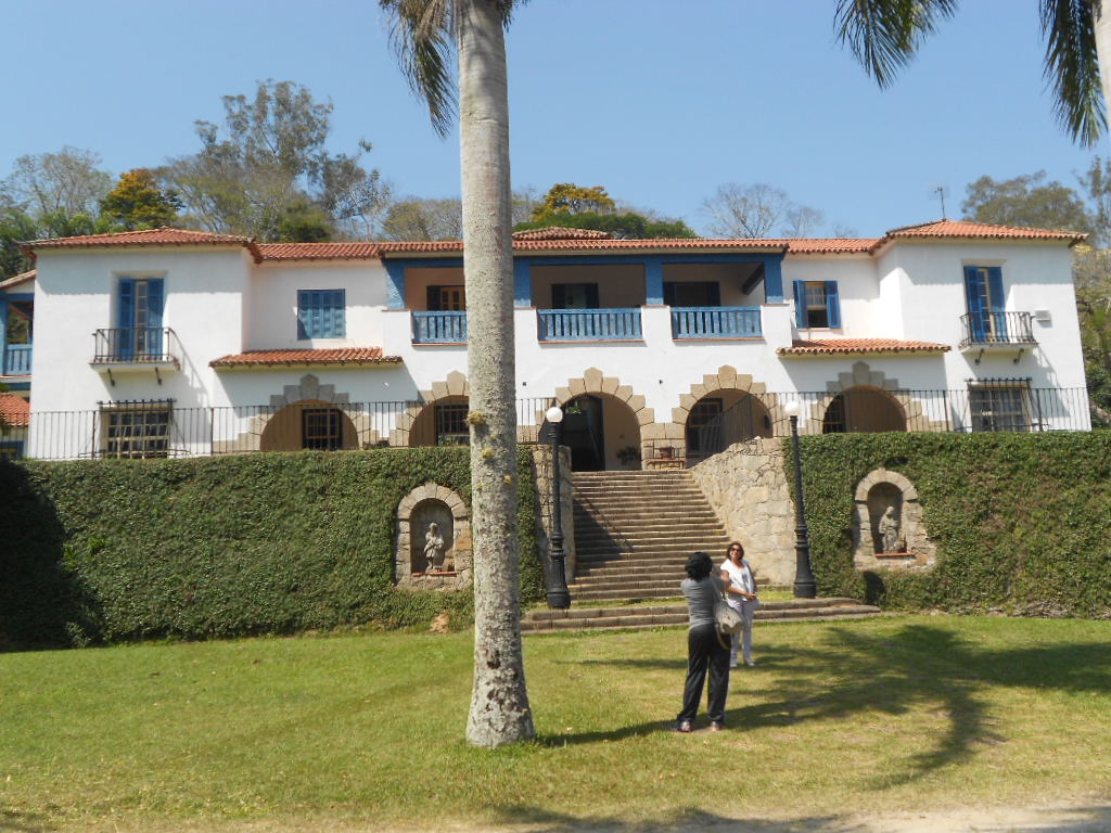 Pousada Fazenda Ponte Alta, em Barra do Piraí, estado do Rio de Janeiro, Brasil.